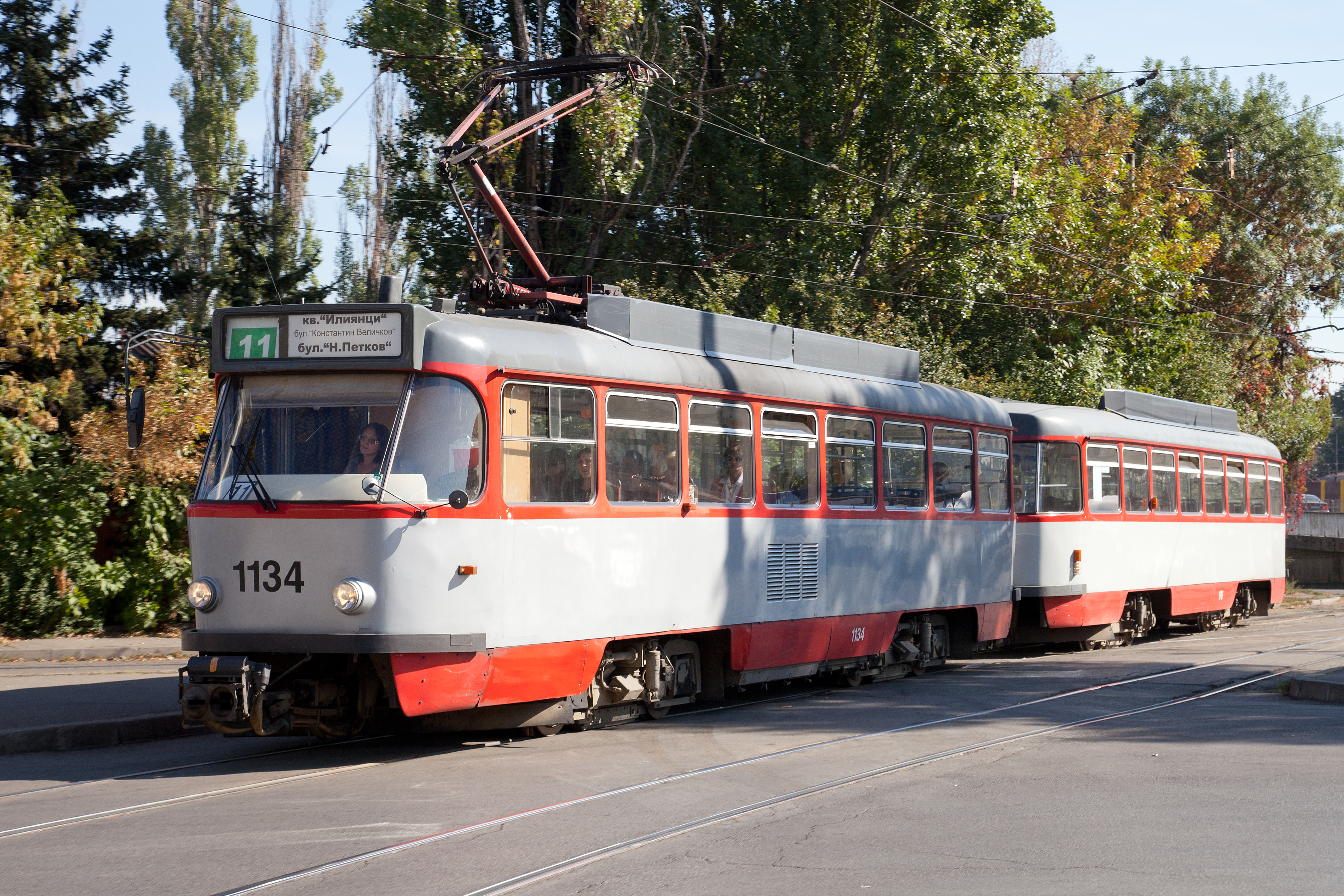 Straßenbahn in Sofia